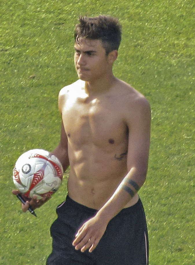 Il calciatore argentino Paulo Dybala all'US Città di Palermo nel 2015.